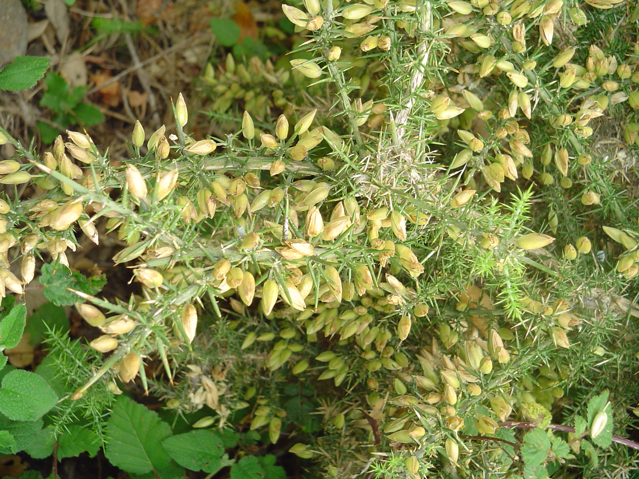 Ulex borgiae, aulaga propia de las Sierras de Algeciras y Málaga